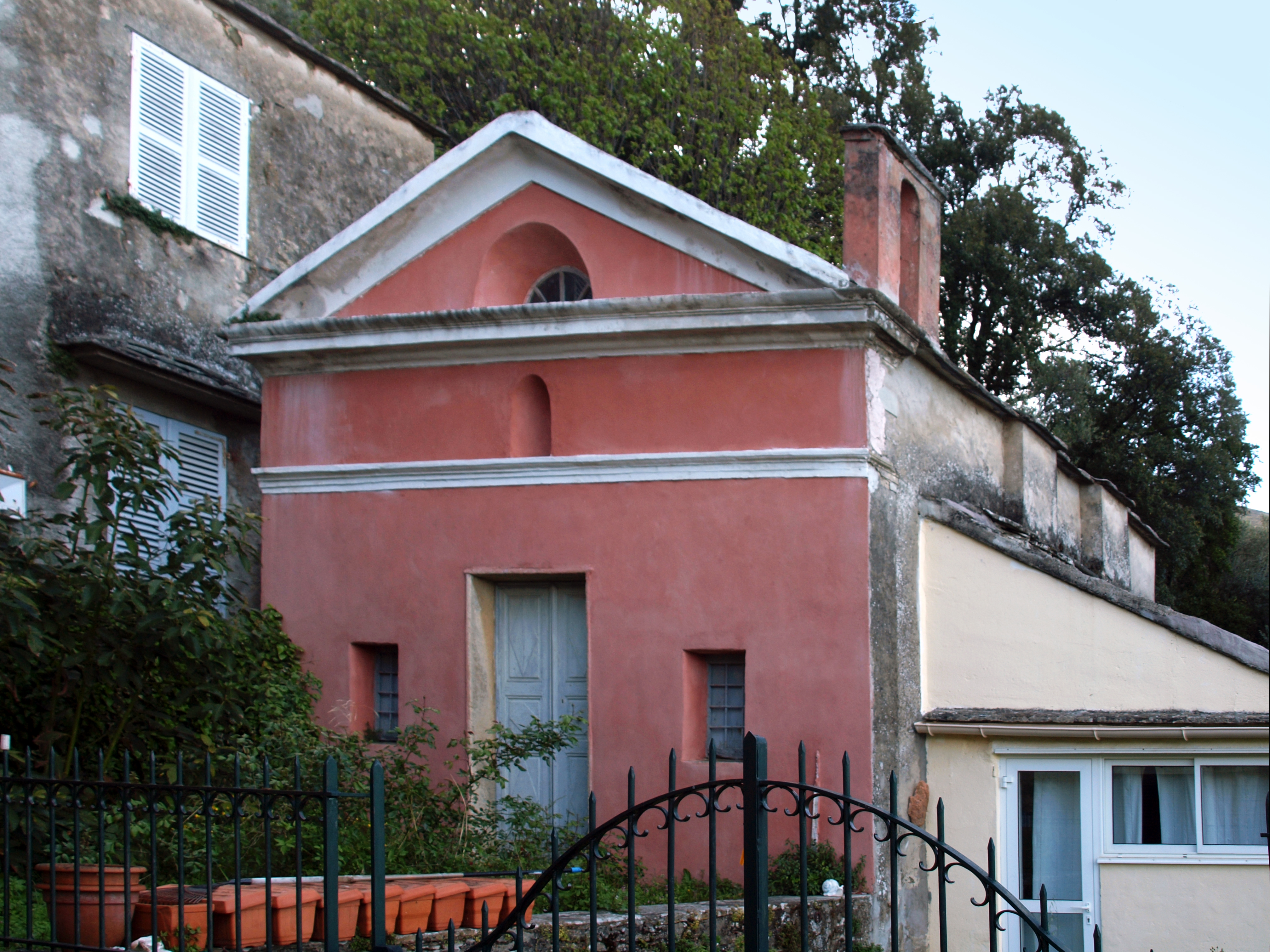 Sisco, Cap Corse (Corse) - Chapelle Santa Maria di a Neve à Barrigioni